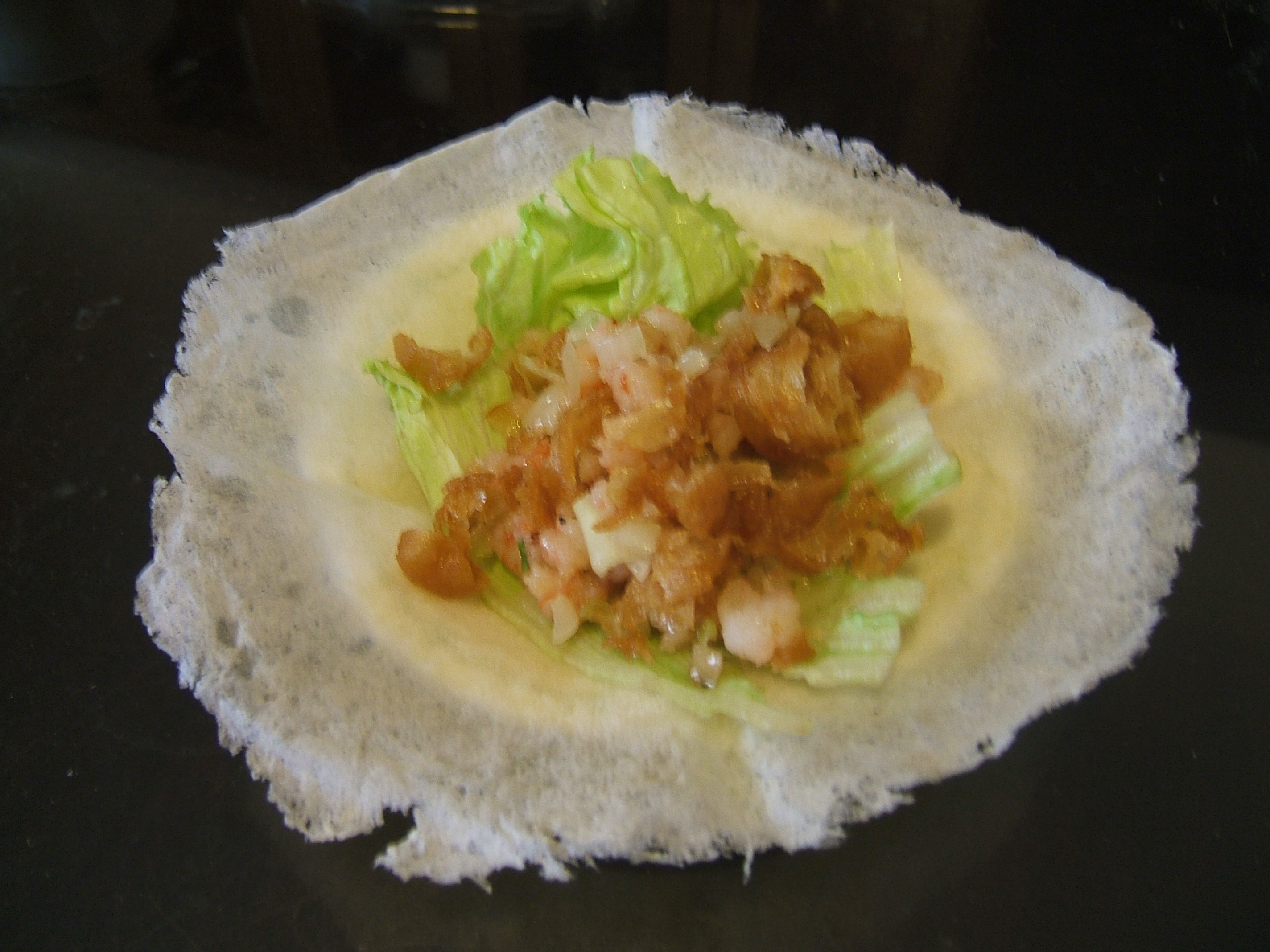 中文（台灣）: 置於潤餅皮上的生菜蝦鬆，由基隆的海鮮餐飲業者烹調後帶至台北自行拍攝